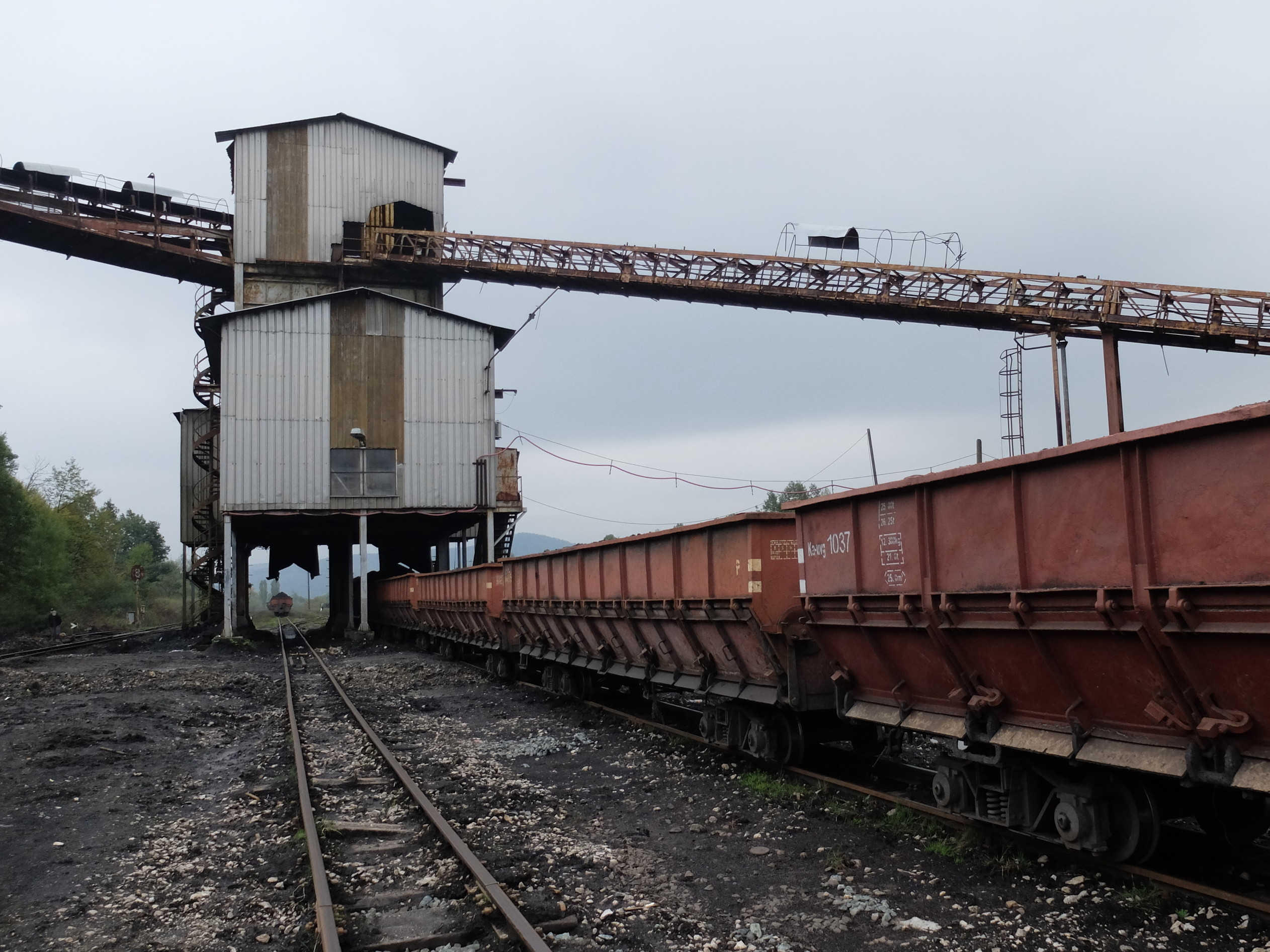 RMU-Verladeanlage in Banovići